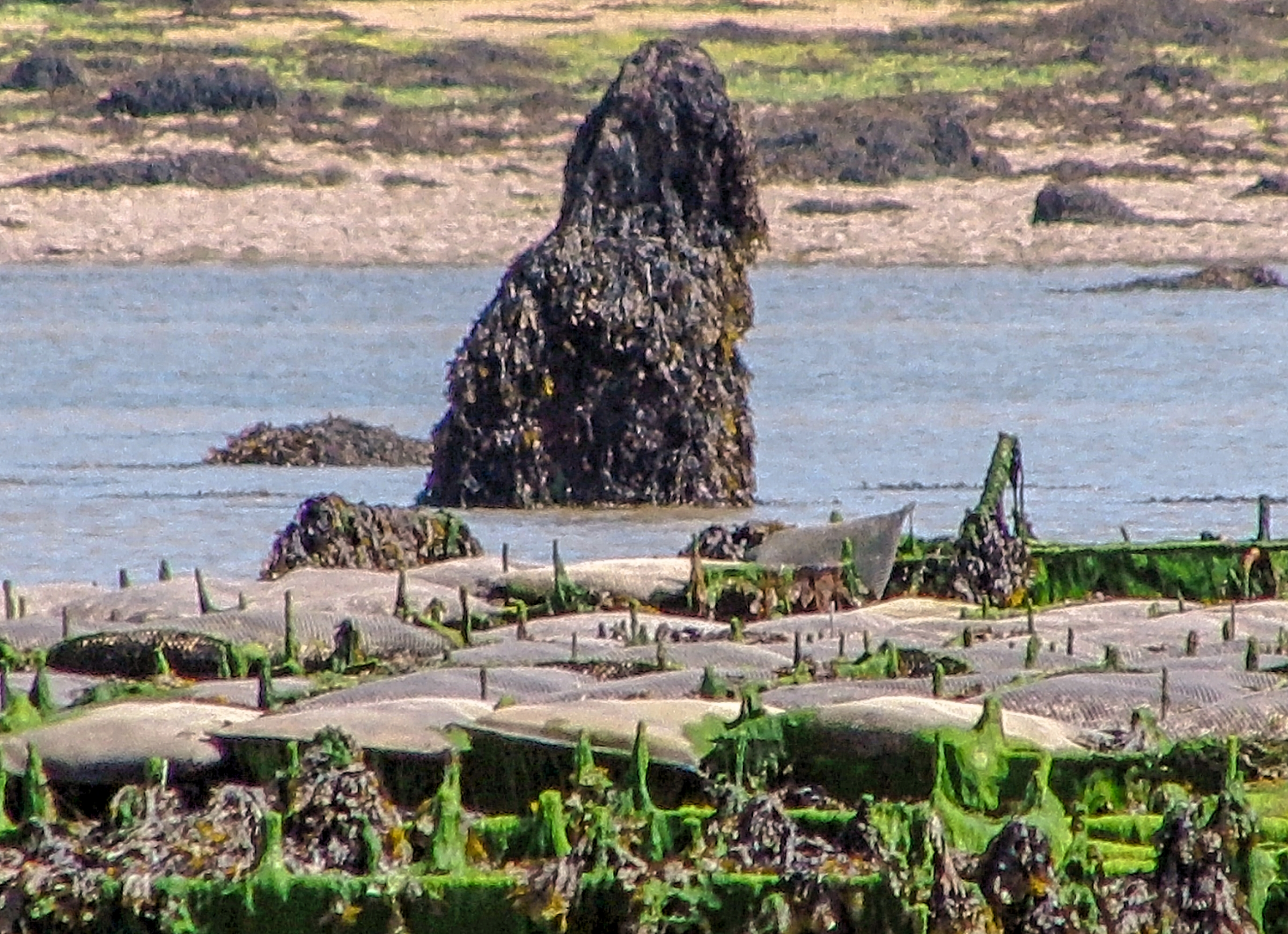 Menhir de Menozac'h (Menhir de Saint Cava,) Plouguerneau dans le département du Finistère Bretagne